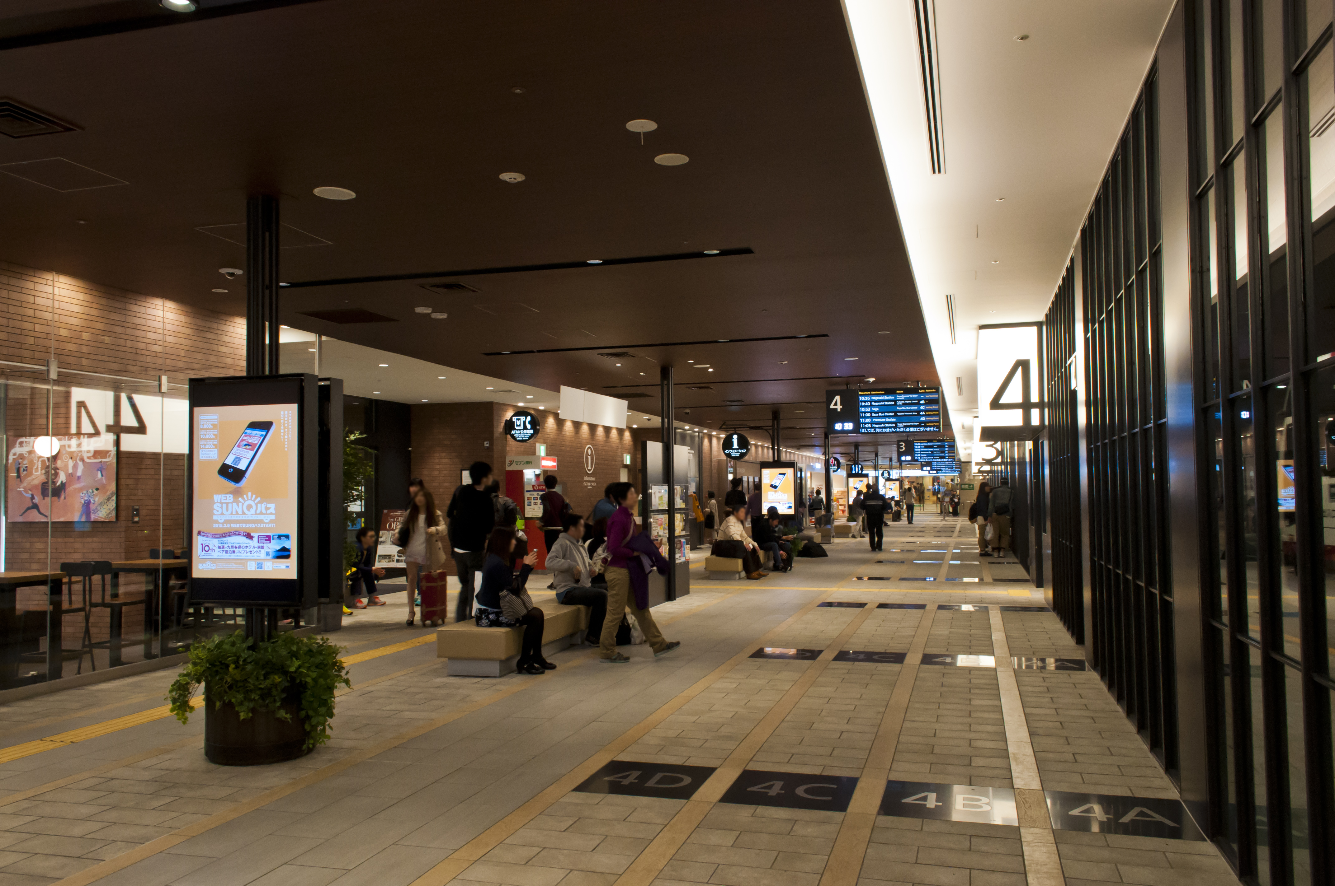 西鉄天神高速バスターミナルの乗車待合所